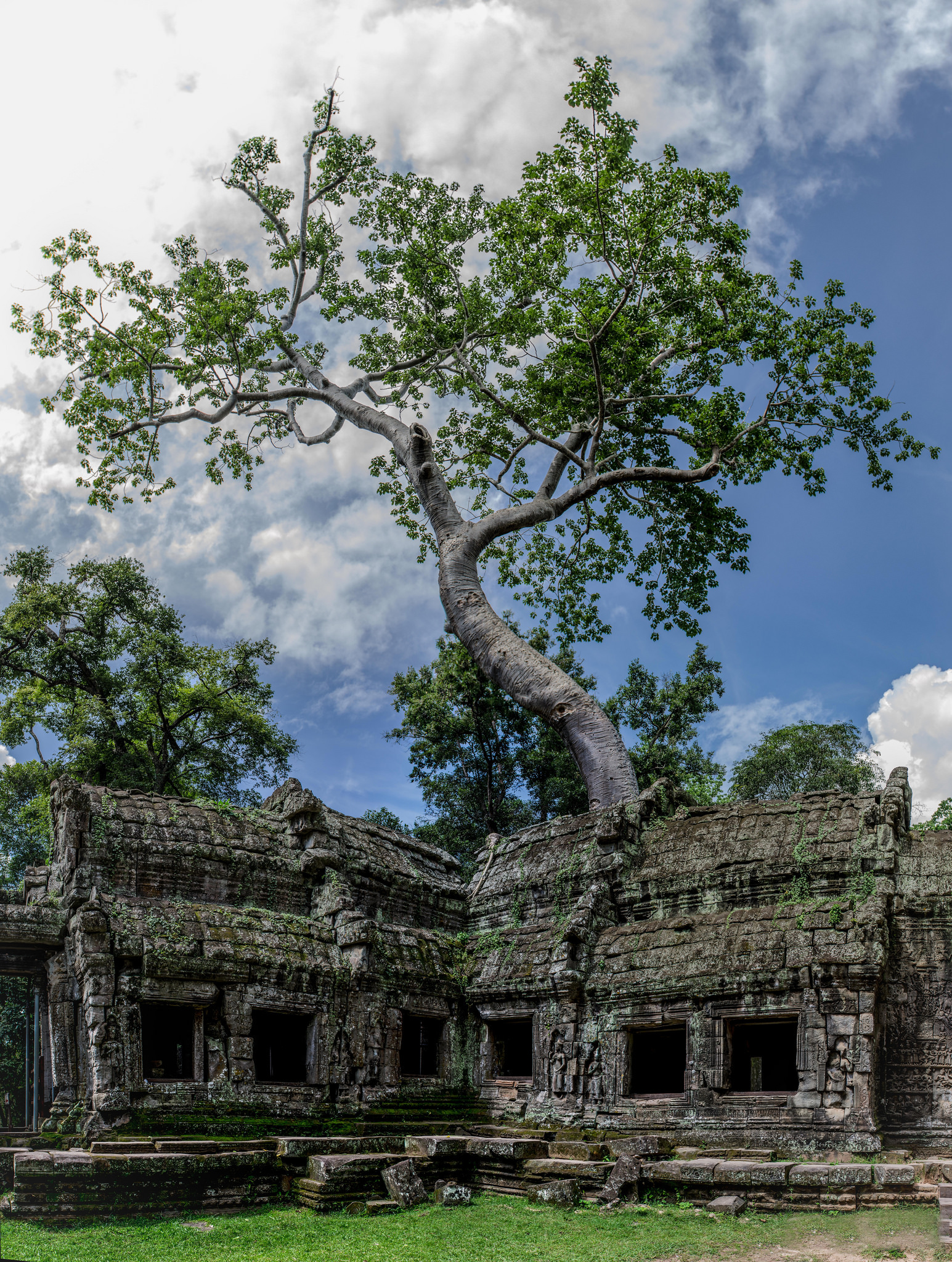 Ta Prohm, Angkor Thom